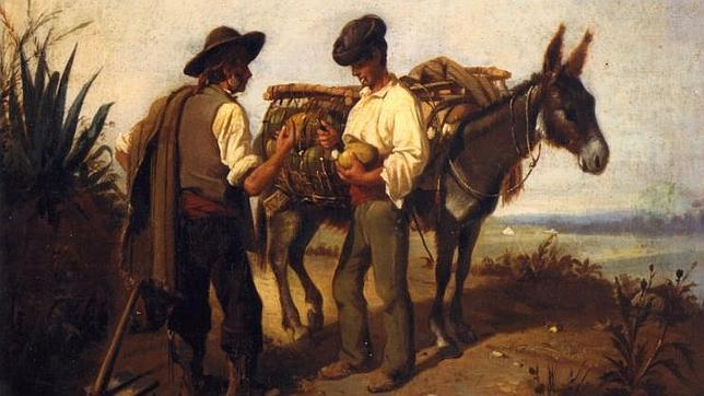 Calando el melón de Manuel Cabral y Aguado Bejarano (1828-1891), óleo sobre lienzo de 37 x 54 cm.